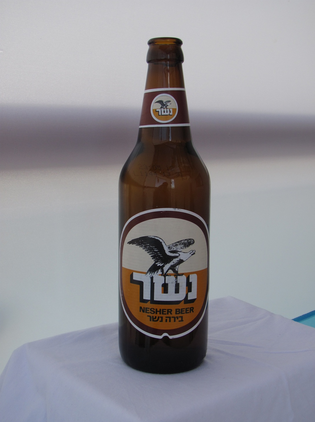 стеклянная бутылка израильского пива Nesher